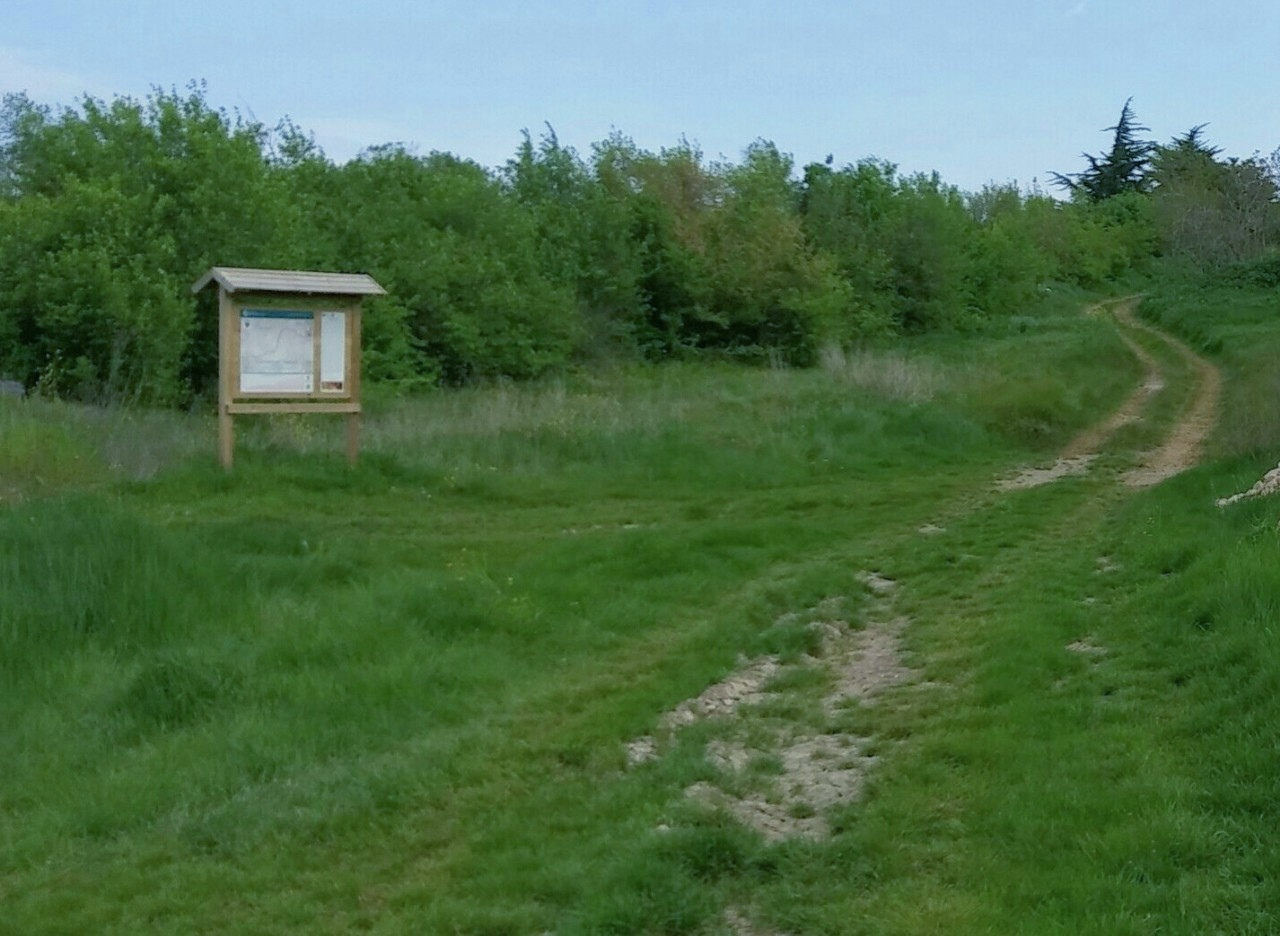 Confluenza fra il tratturello Camporeale-Foggia e la via Francigena (l'antica via Traiana) presso Tre Fontane di Greci